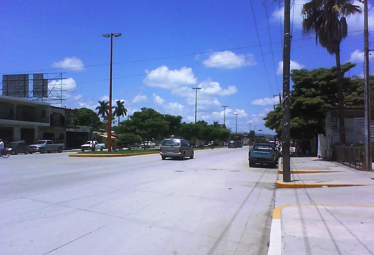 Fotografia tomada en el Boulevard Enrique Cardenas Gonzalez, en un dia soleado situada en Ciudad Mante, Tamaulipas, Mexico. Como podran ver, ese dia hubo pocas nubes y normalmente asi son los dias aqui, estabamos alrededor de unos 35° C